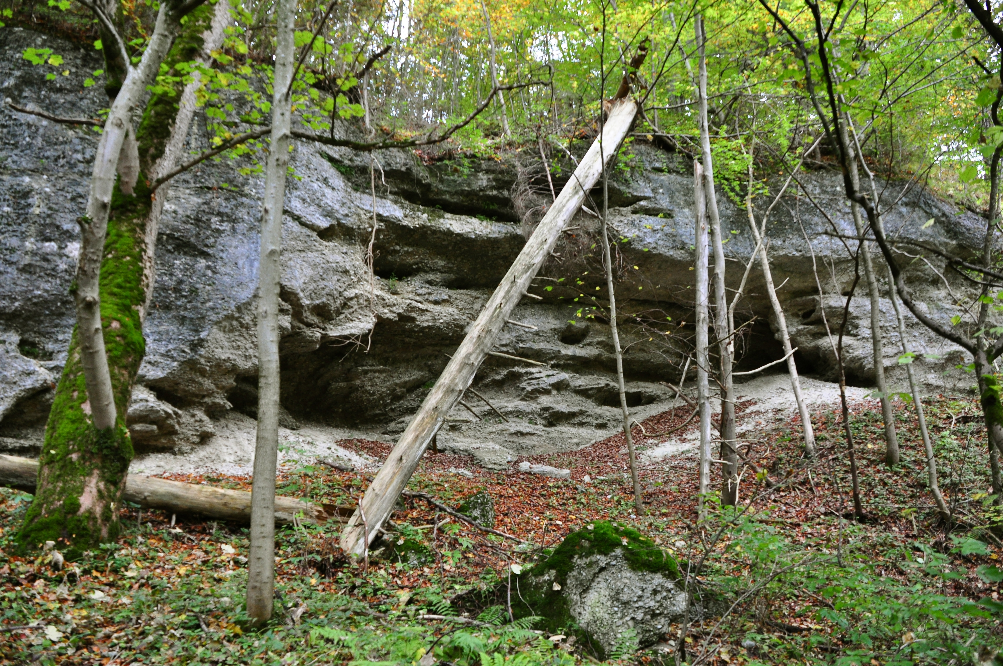 Nagelfluhhang am Burgstall Andechs